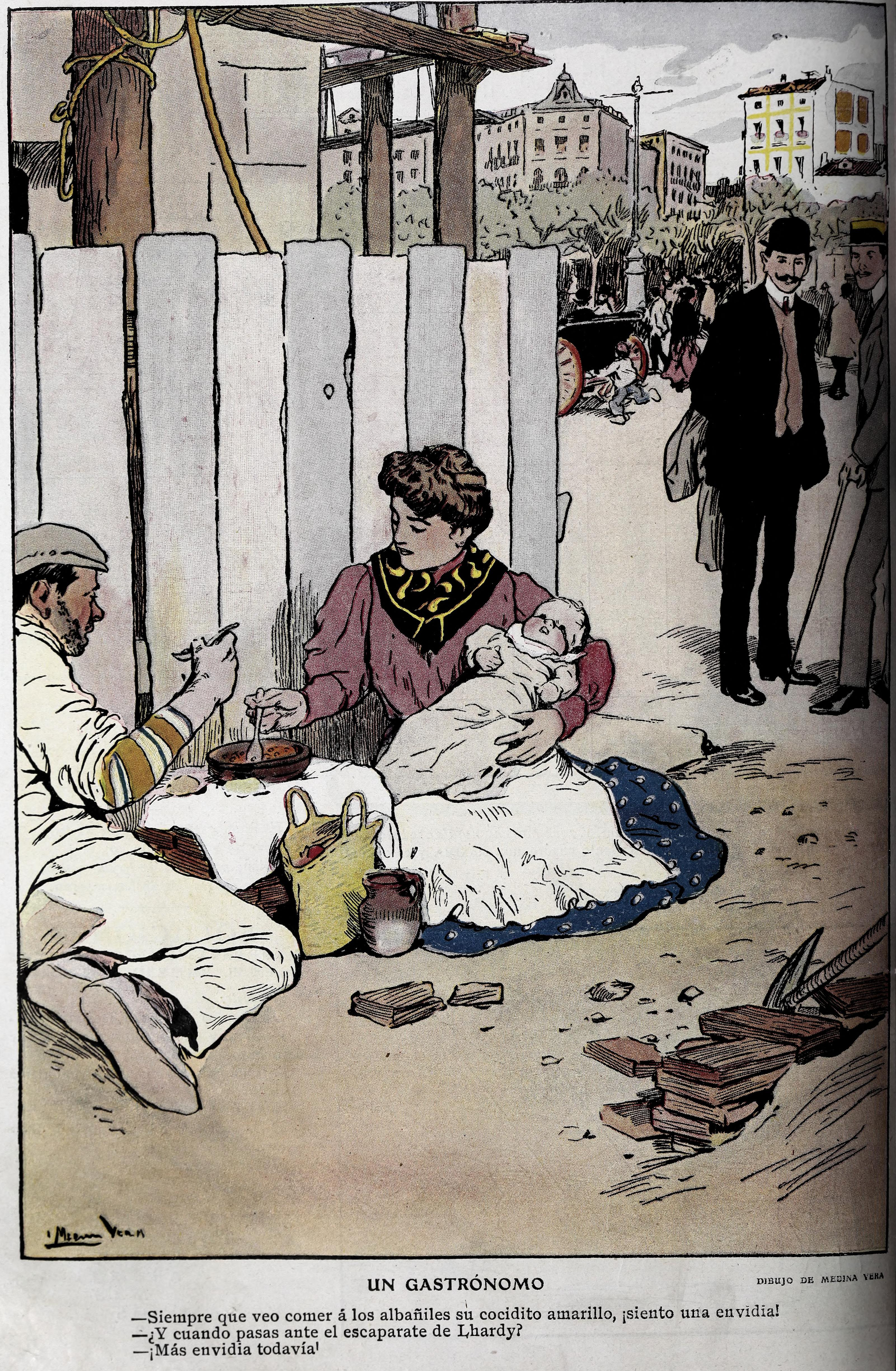 Un gastrónomo.